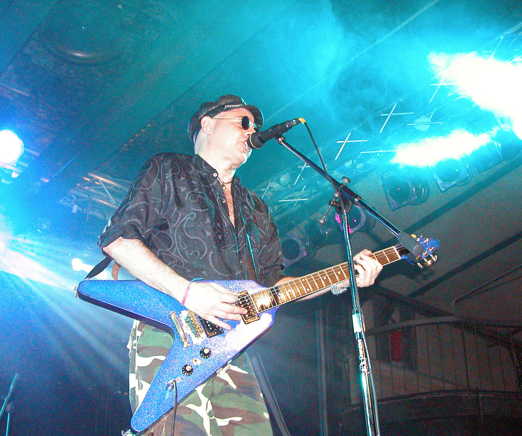 Fabio Nardelli live 2007